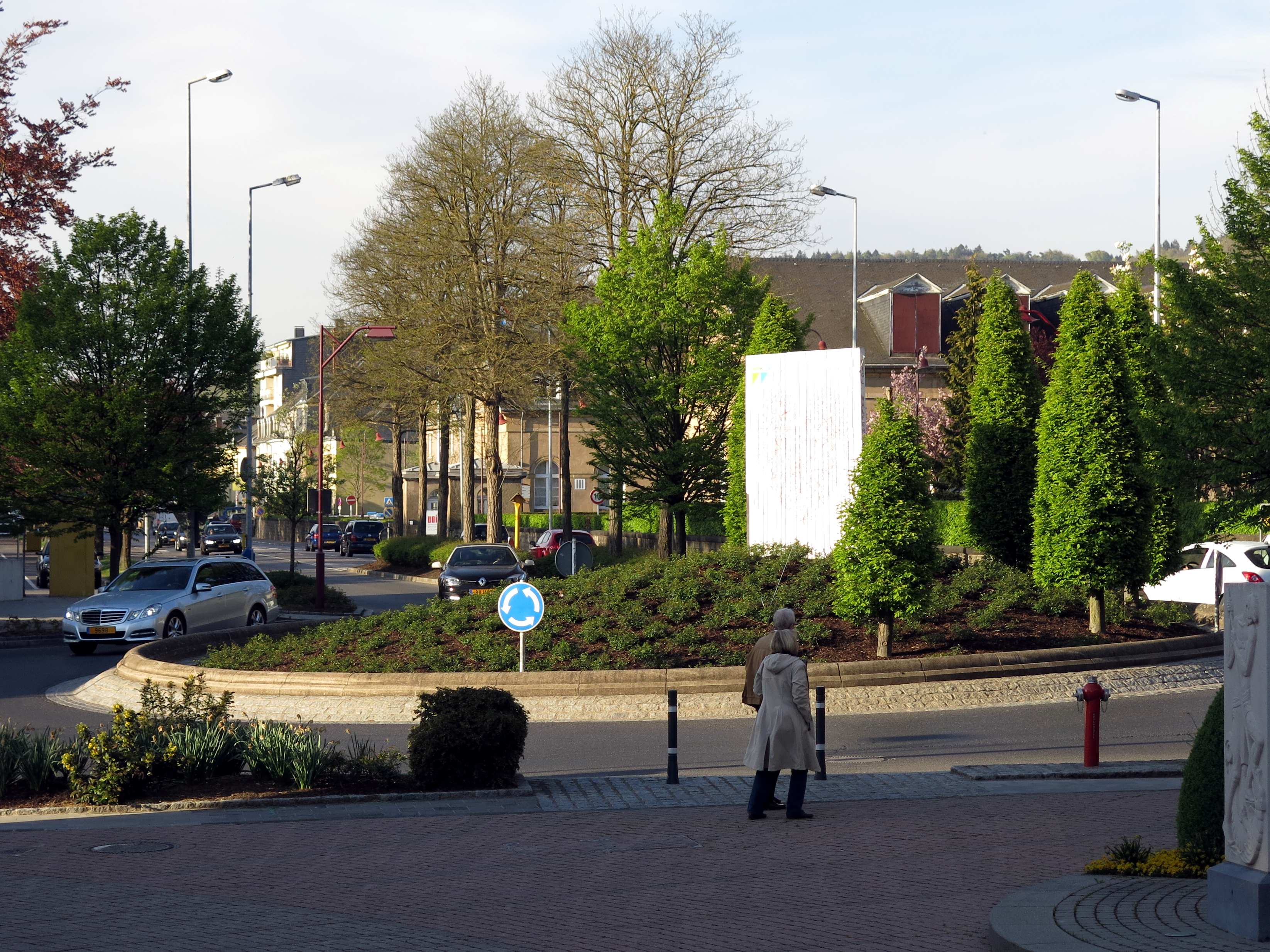 De Rond-point des roses zu Walfer.